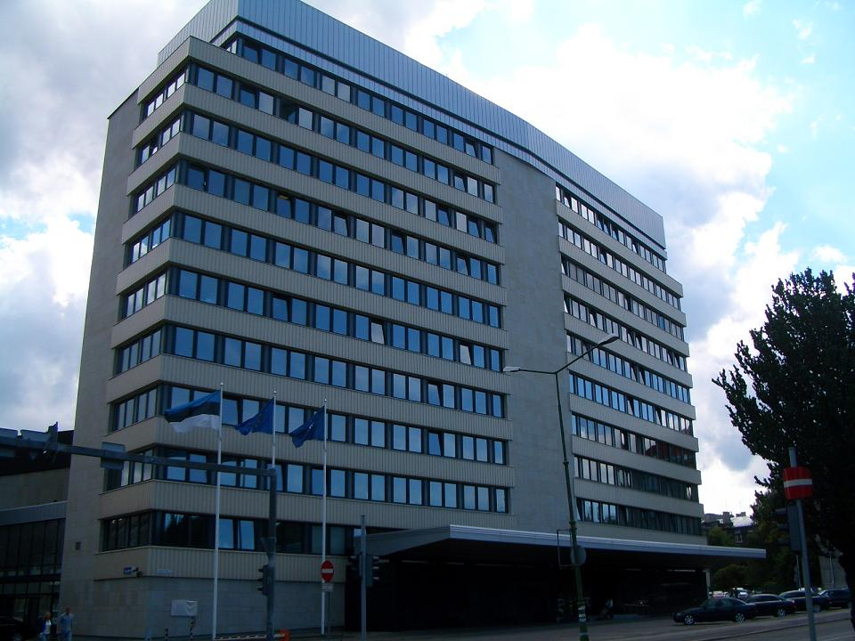 Välisministeerium